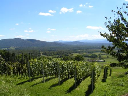 Vinograd u Hrvatskoj